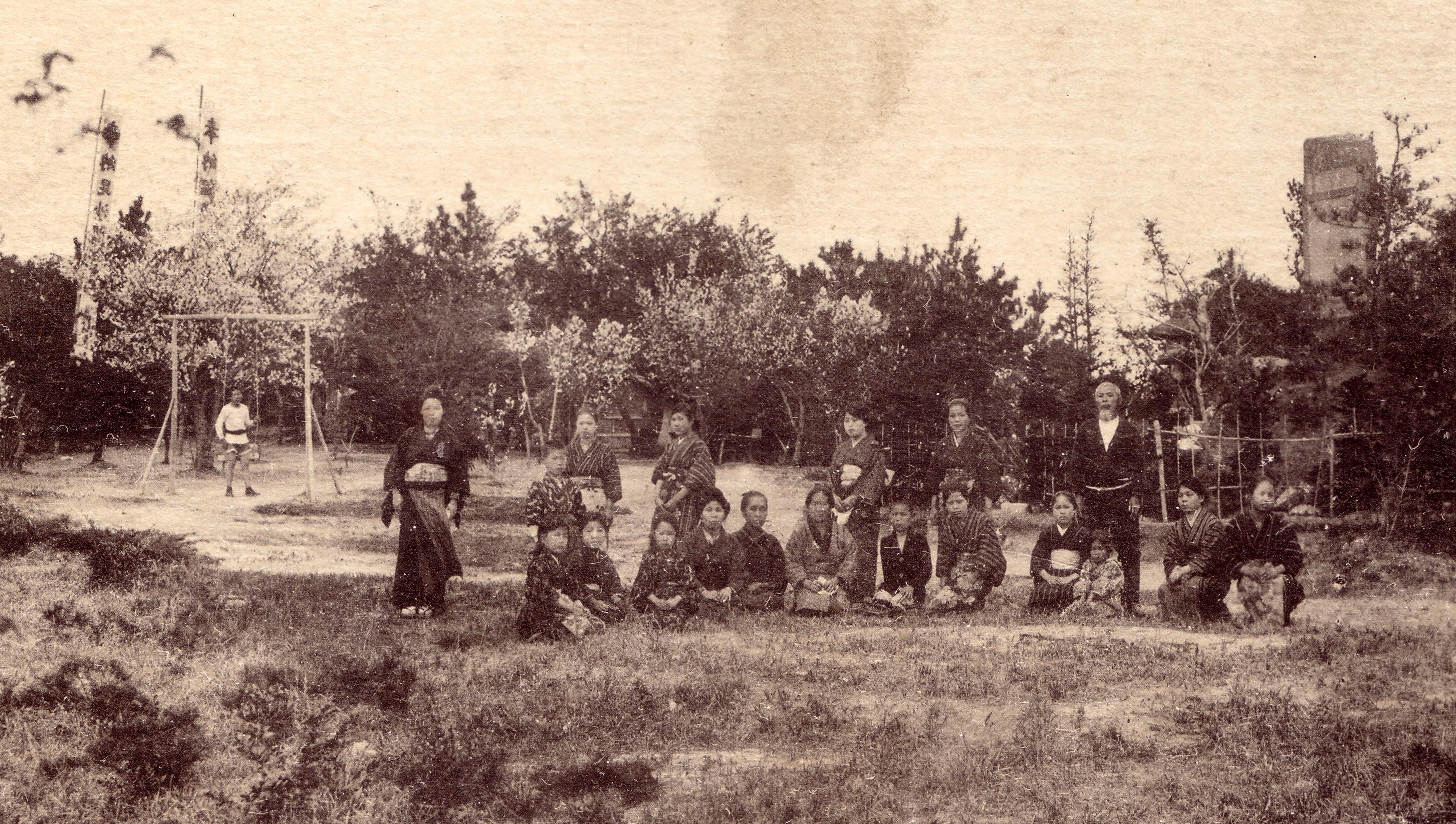 大正中期の救済所。画像の右から三人目は榊原亀三郎。